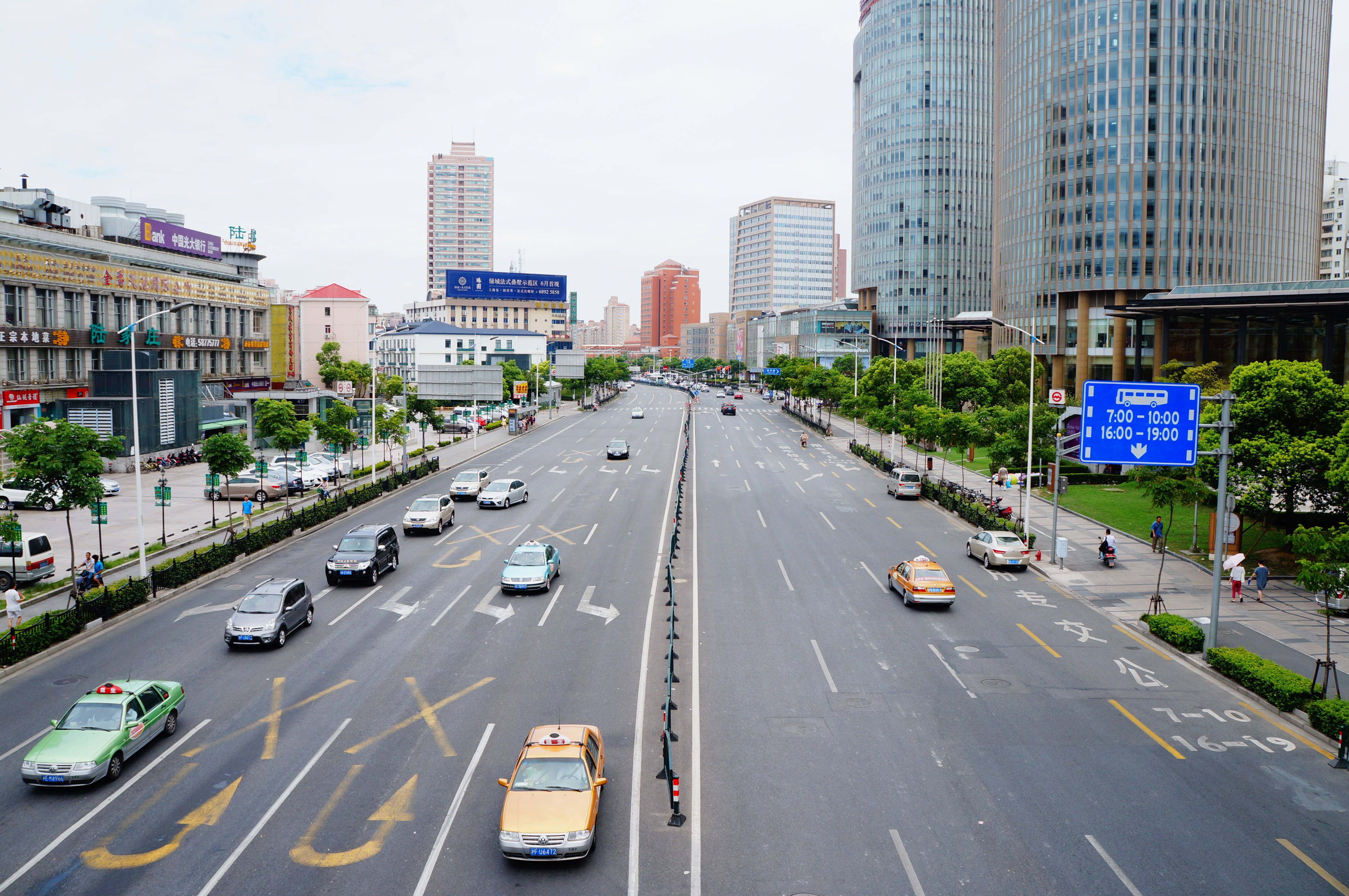 Large boulevard 浦建路（从浦东南路望向浦华路，地下为塘桥地铁站）